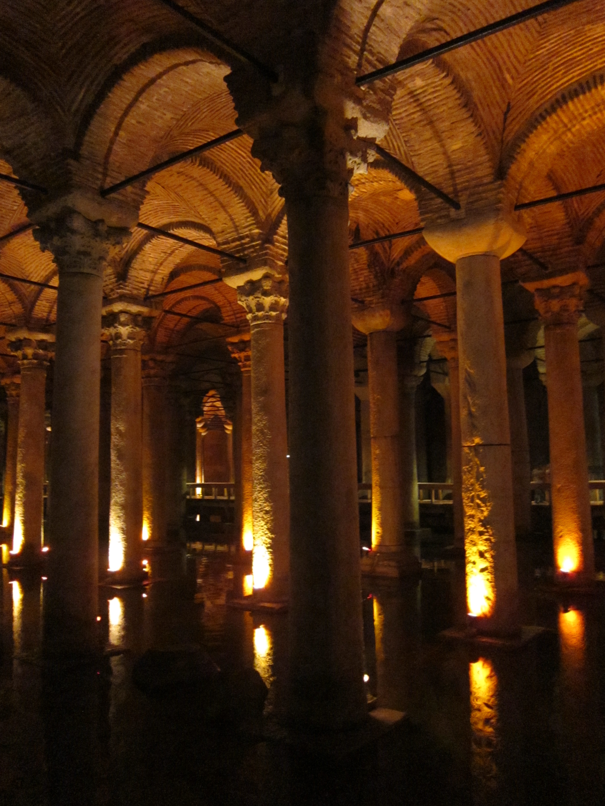 地下水宮殿之拱門